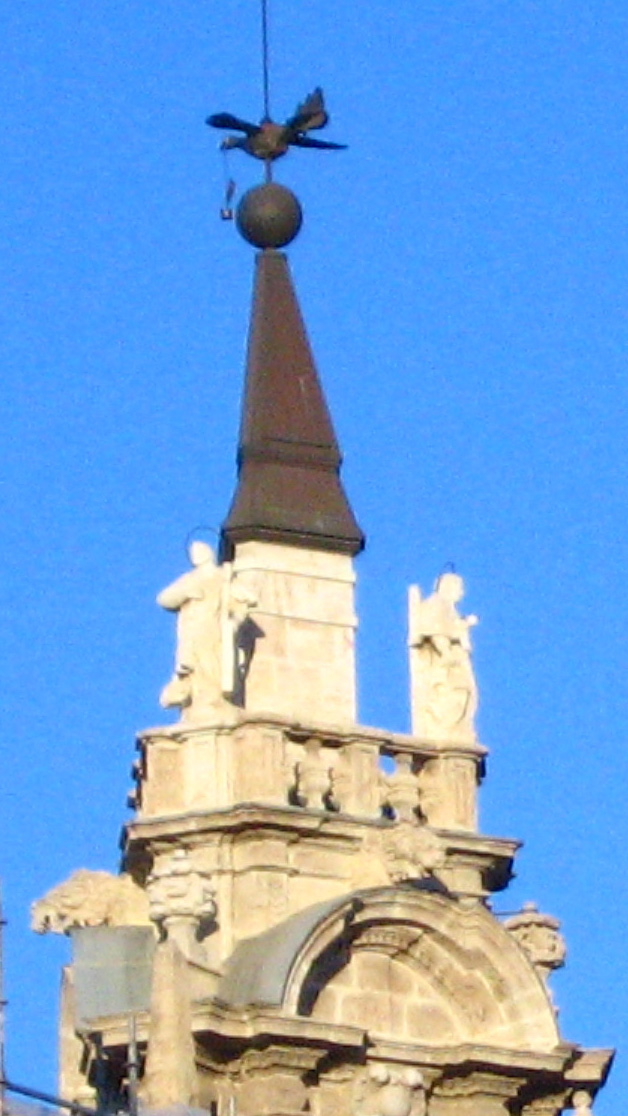 El Pardalot de Sant Joan (del Mercat)(Valencia, Spain)